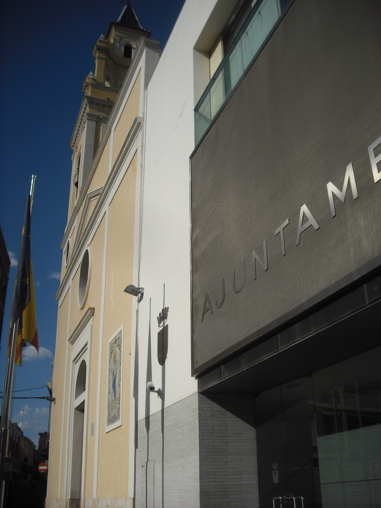 Església i ajuntament de Sedaví.